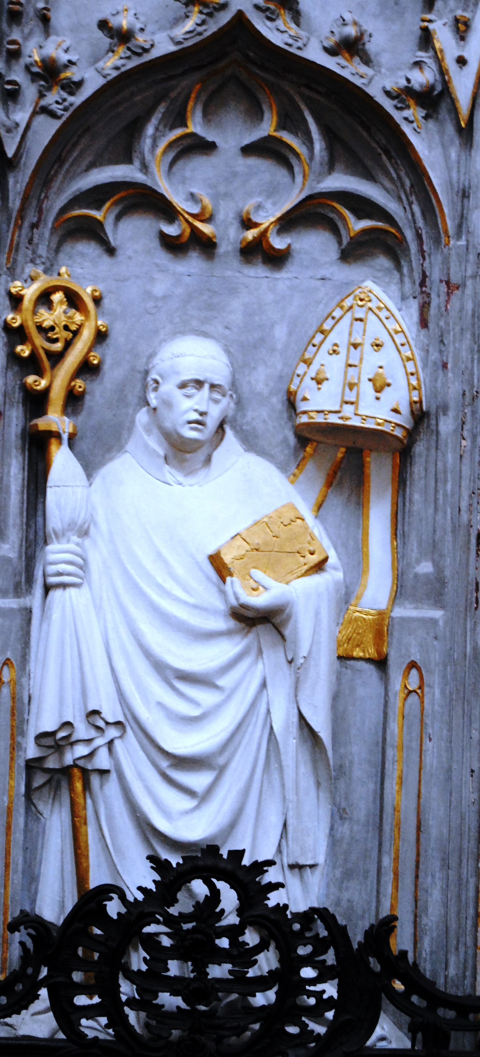 Epitaph des Abtes Bartholomäus Fröwein von Kloster Ebrach, Klosterkirche Ebrach, Amtszeit 1426-1430